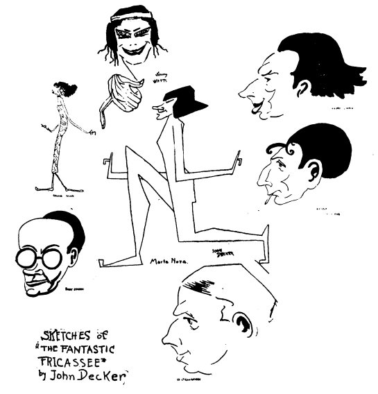 John Decker a fantastic fricassee revue The Quill November 1922 The Greenwich Village Quill